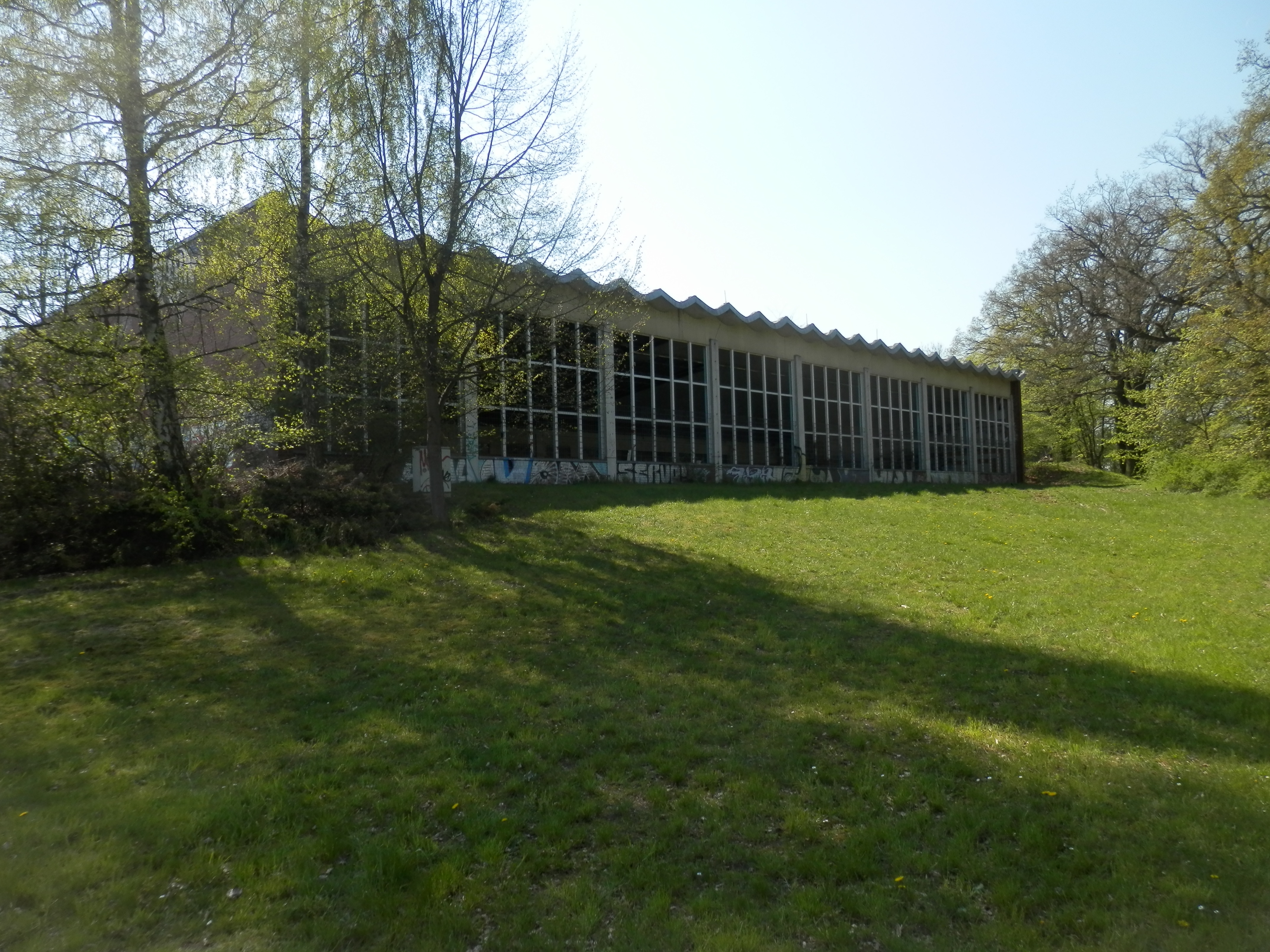 Ostfassade der Volksschwimmhalle Lankow (Schwerin) vor der Sanierung